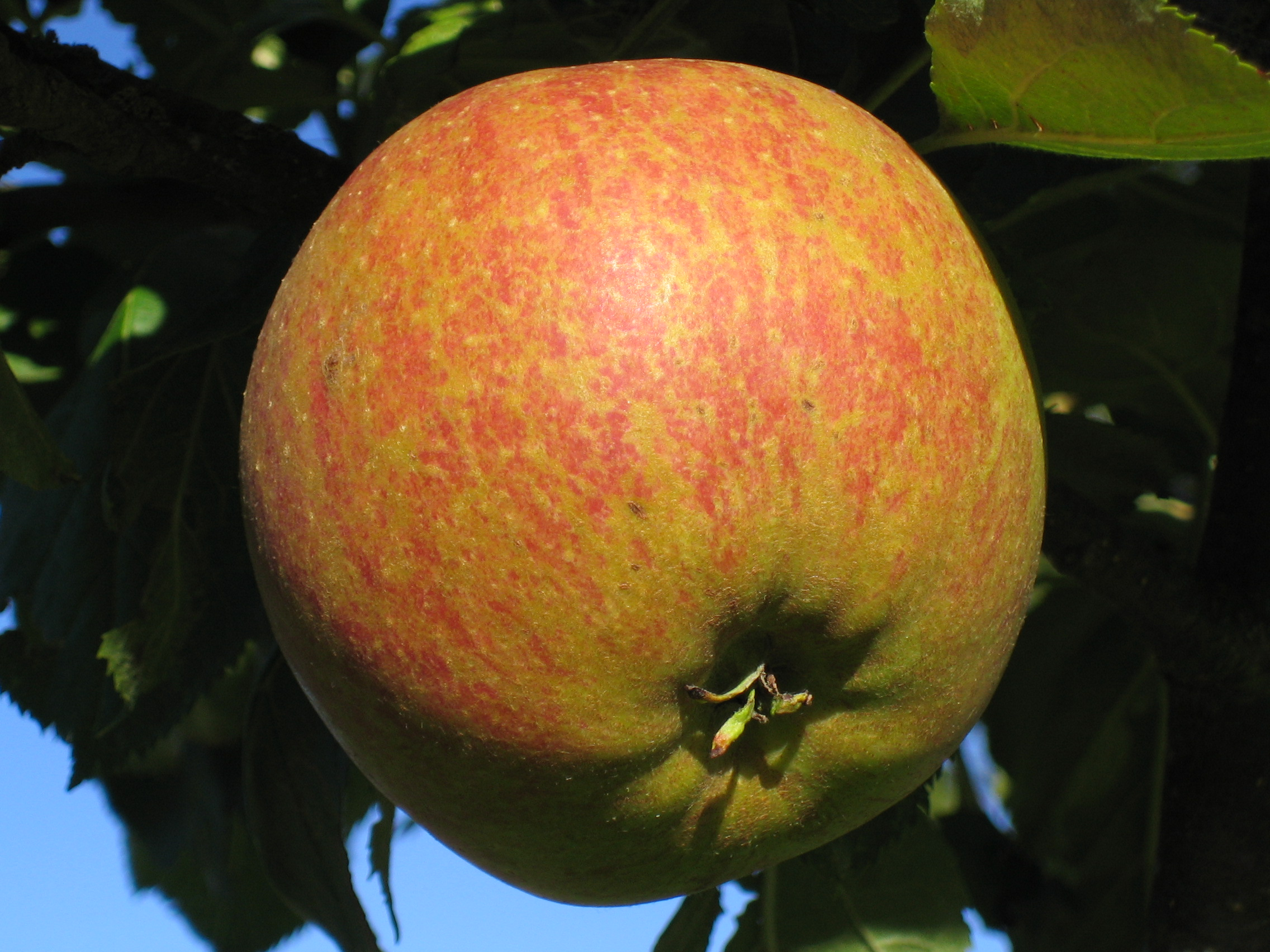 cox orange renette cox orange renette